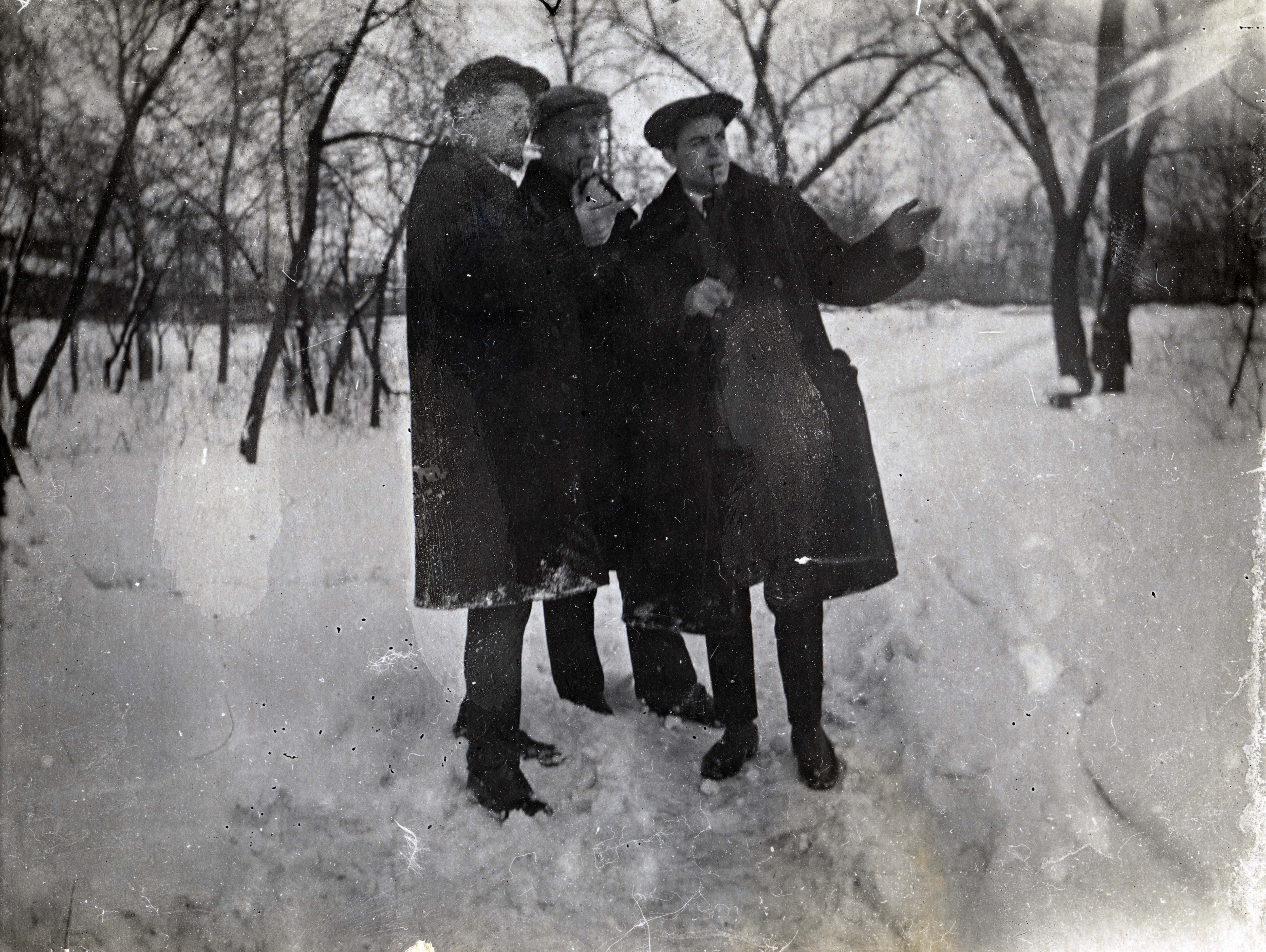 Густав Шольц (слева) с сыном Виктором (справа). Луганск 1933 год.